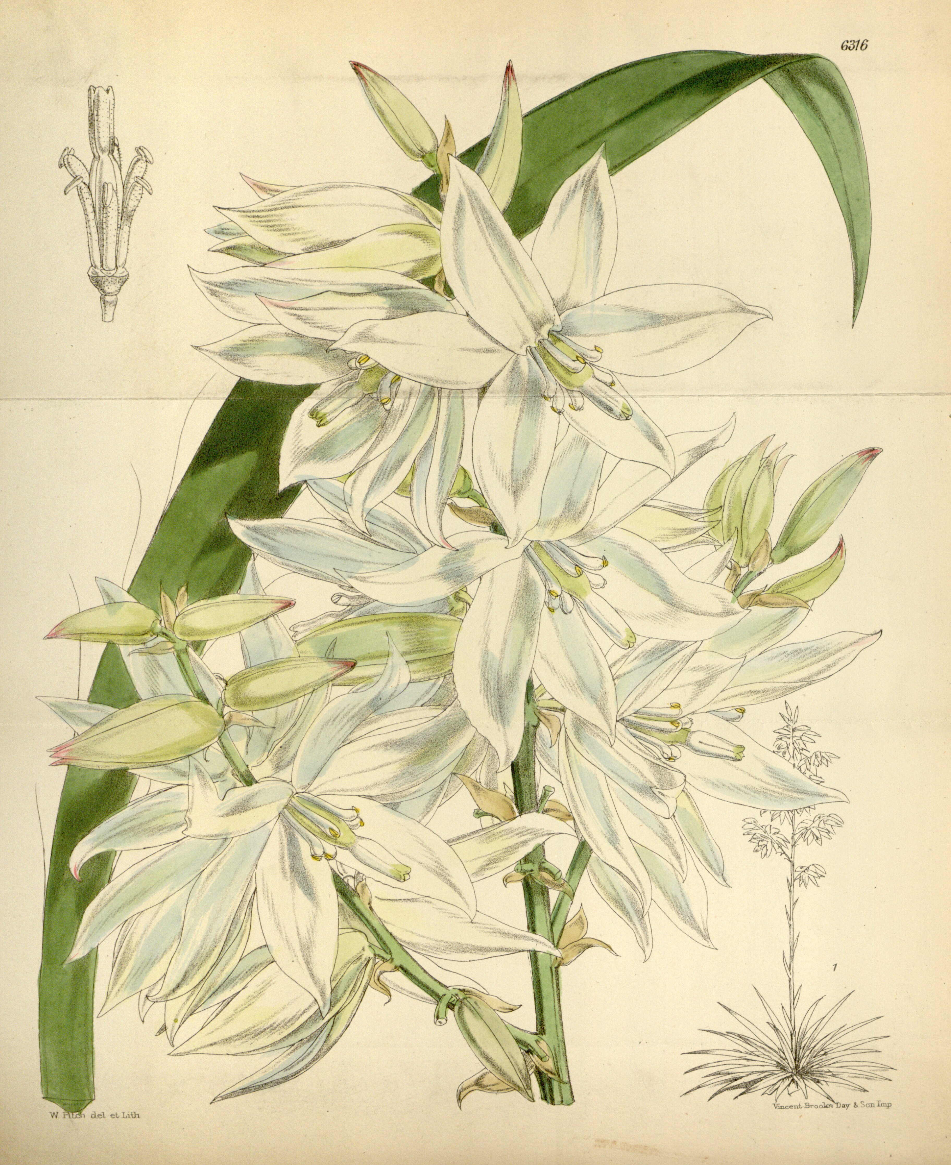 Yucca flaccida